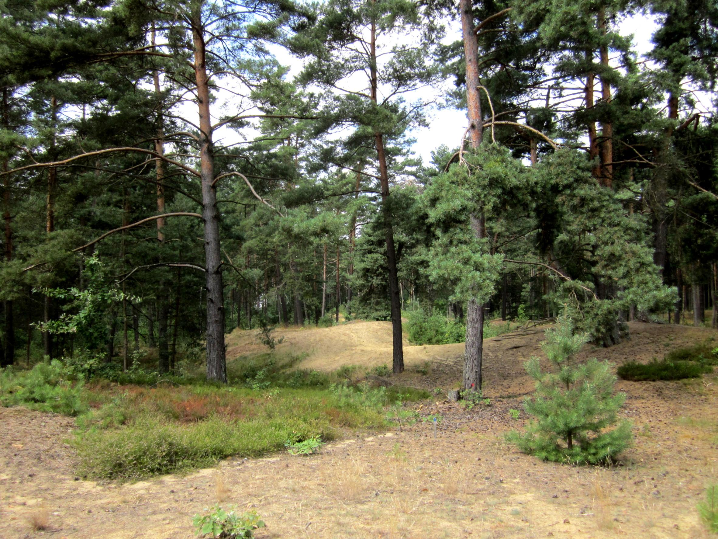 Naturschutzgebiet „Binnendünen bei Siegenburg und Offenstetten“ (NSG-00221.01, Niederbayern). Sandige Hügel zwischen Kiefern. – Die Dünen bei Siegenburg und Offenstetten in Niederbayern enstanden aus Flugsand. Nach der letzten Eiszeit war der Boden aufgrund von spärlichem Bewuchs nicht ausreichend vor Erosion geschützt. Leichte Sandkörner wurden aus den Donauniederungen angeweht. Die bis zu zehn Meter hohen Sanddünen existieren bis heute. Bis zur Bewaldung der Dünen nach der Eiszeit waren die Dünen in ständiger Bewegung. Heute sind die Sanddünen großteils von Kiefernwäldern bedeckt. In den Dünen leben seltene, gefährdete und hoch spezialisierte Tiere und Pflanzen. Nährstoffarmut, Wassermangel und der sandige Untergrund forderten sie seit jeher und führten zu enormen Spezialisierungen.